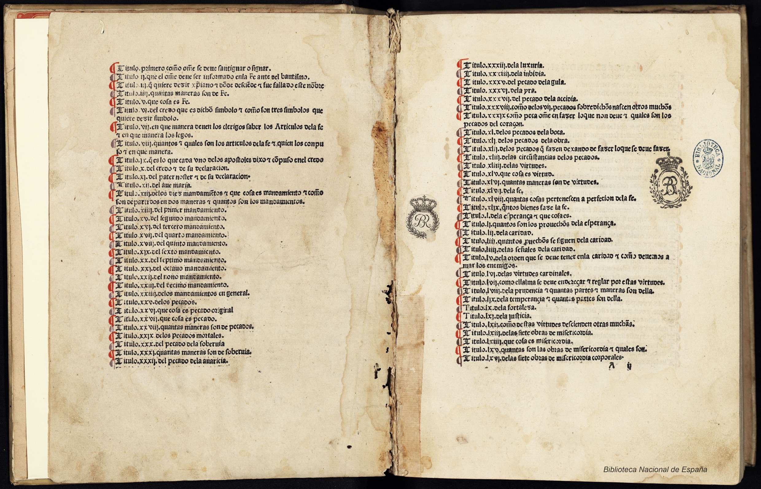 Sacramental Autor: Fecha: 1478 Datos de edición: En la muy noble [et] muy leal çibdad de sevilla los discretos [et] diligentes maestros Anton martinez [et] bartolome segura [et] alfonso del puerto ynprimieron esta obra